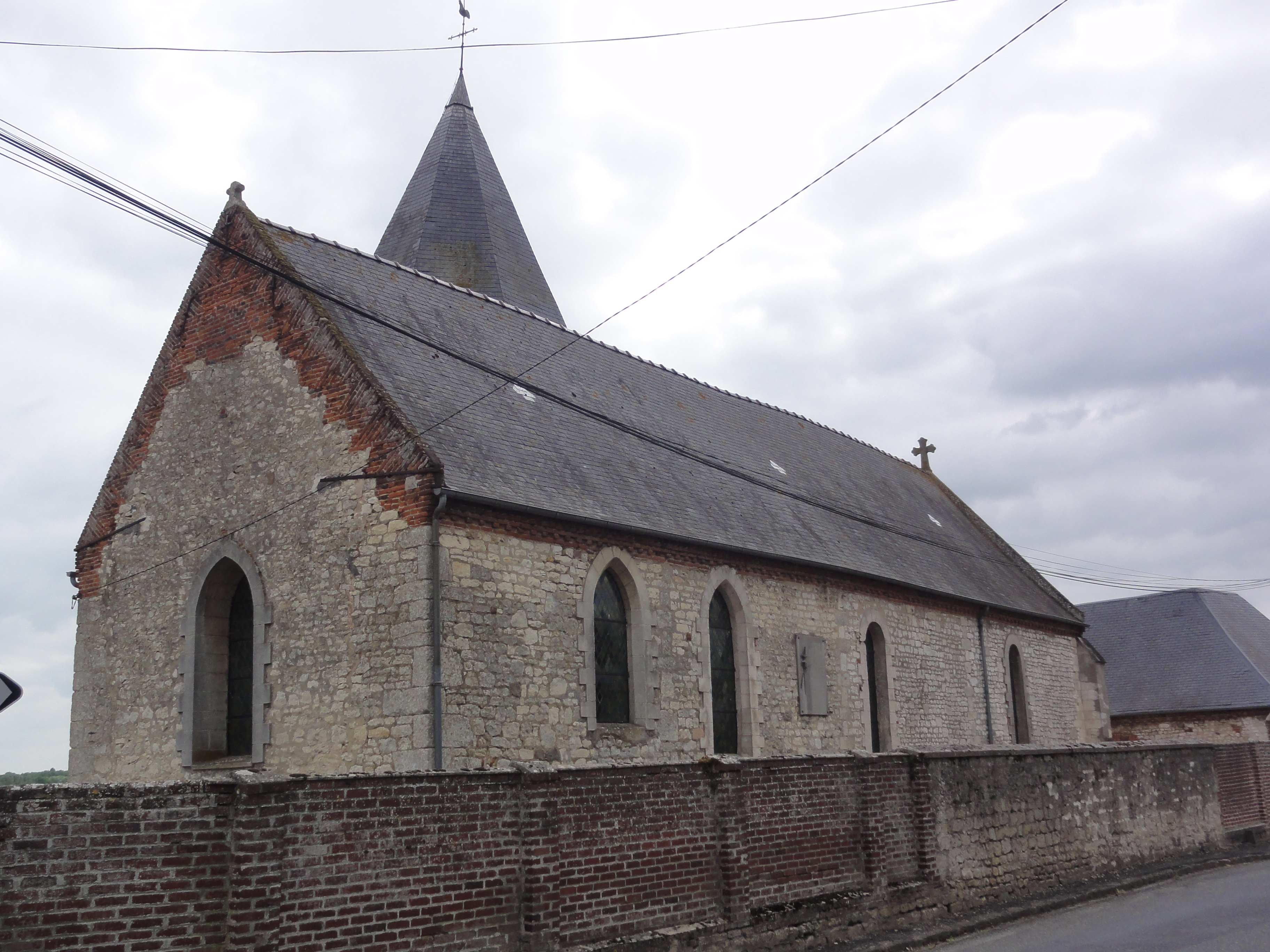 Toulis-et-Attencourt (Aisne) église